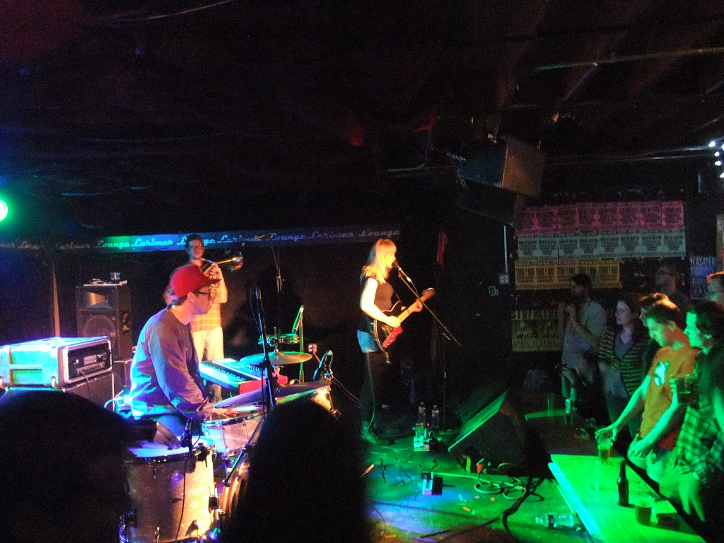 139 Wye Oak